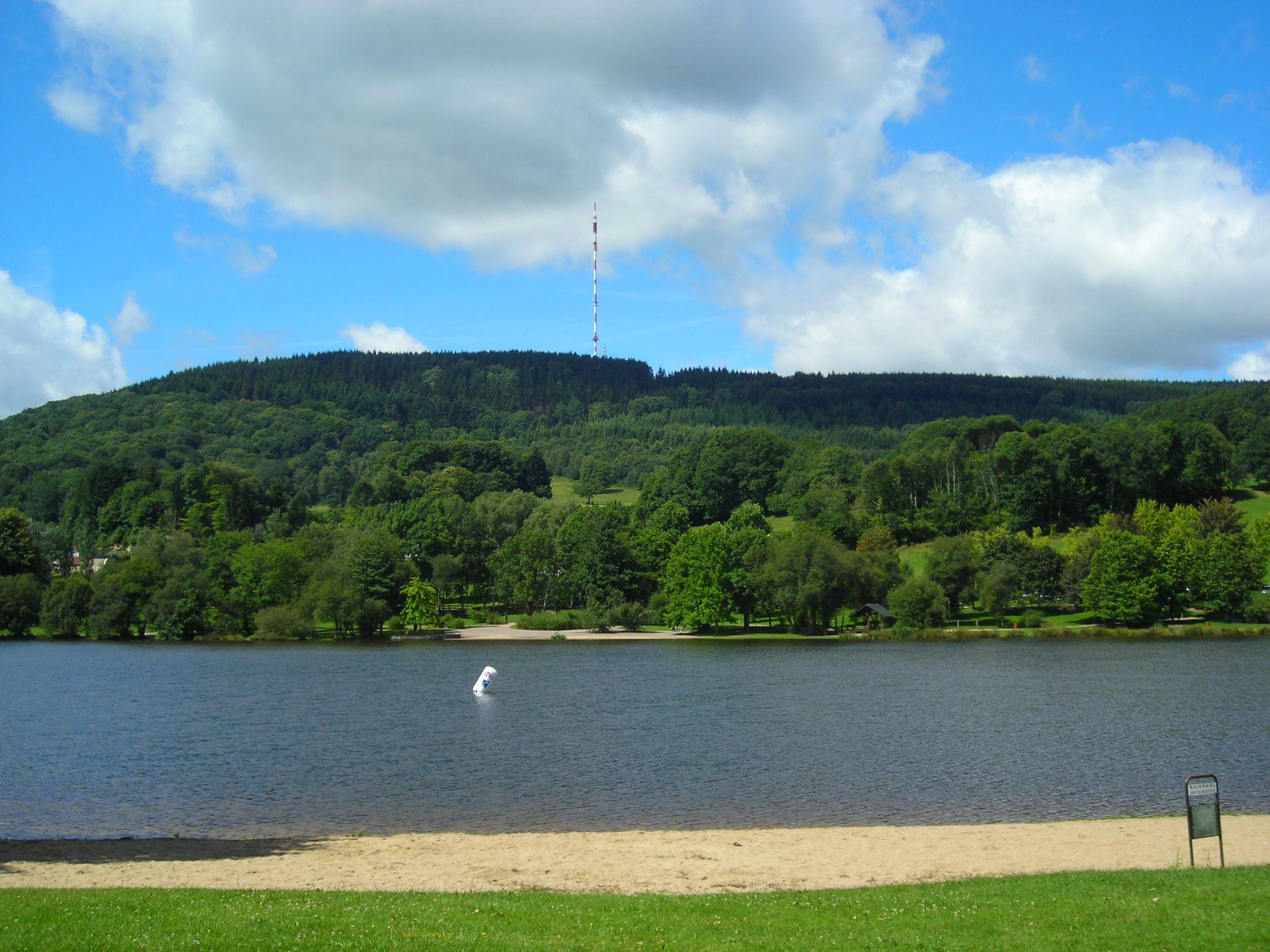 gueret courtille 84511